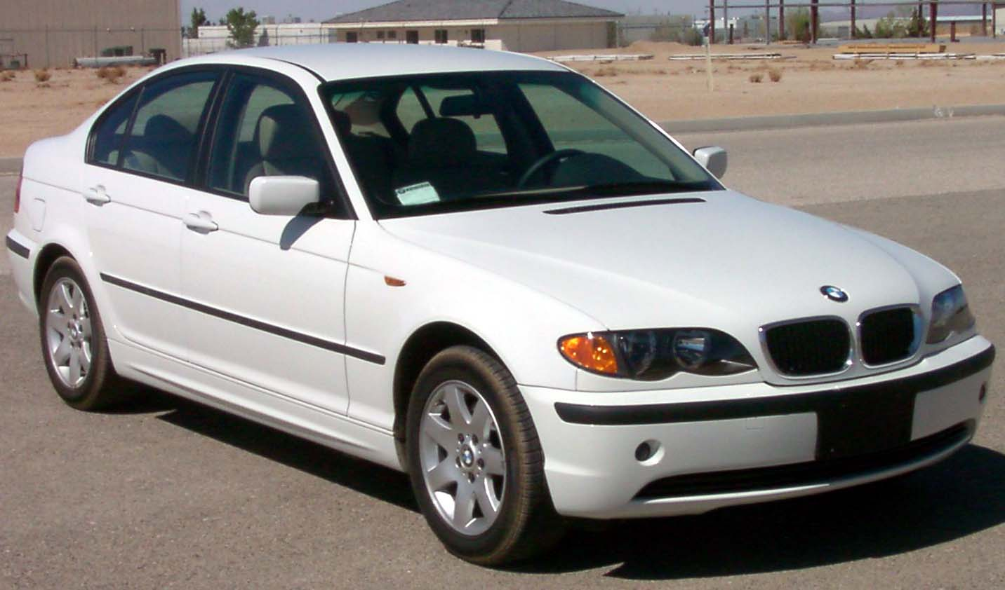 2002 BMW 325i